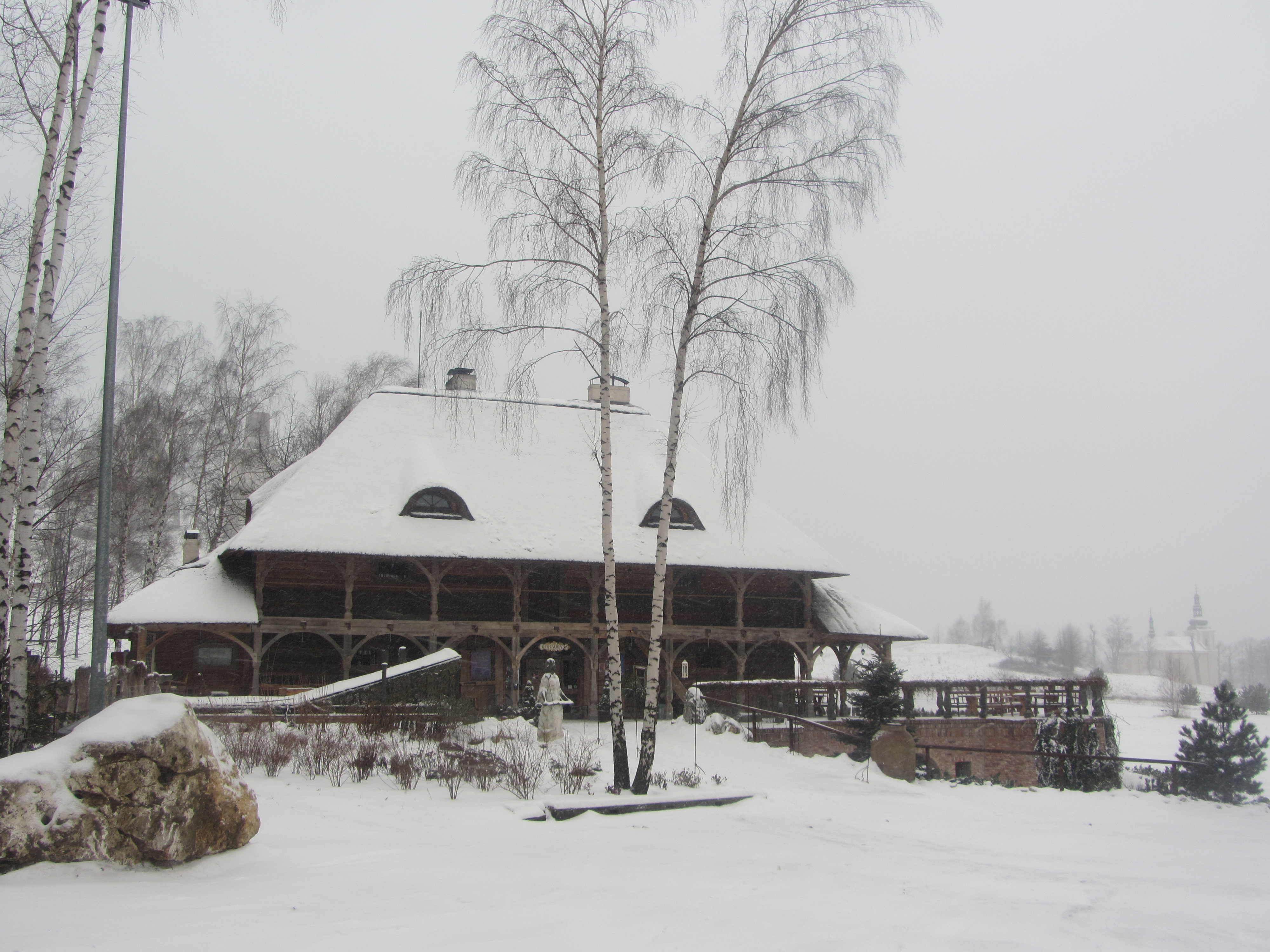 Olsztyn - spichlerz drewniany, przeniesiony z Borowna (zabytek nr A/15/78)